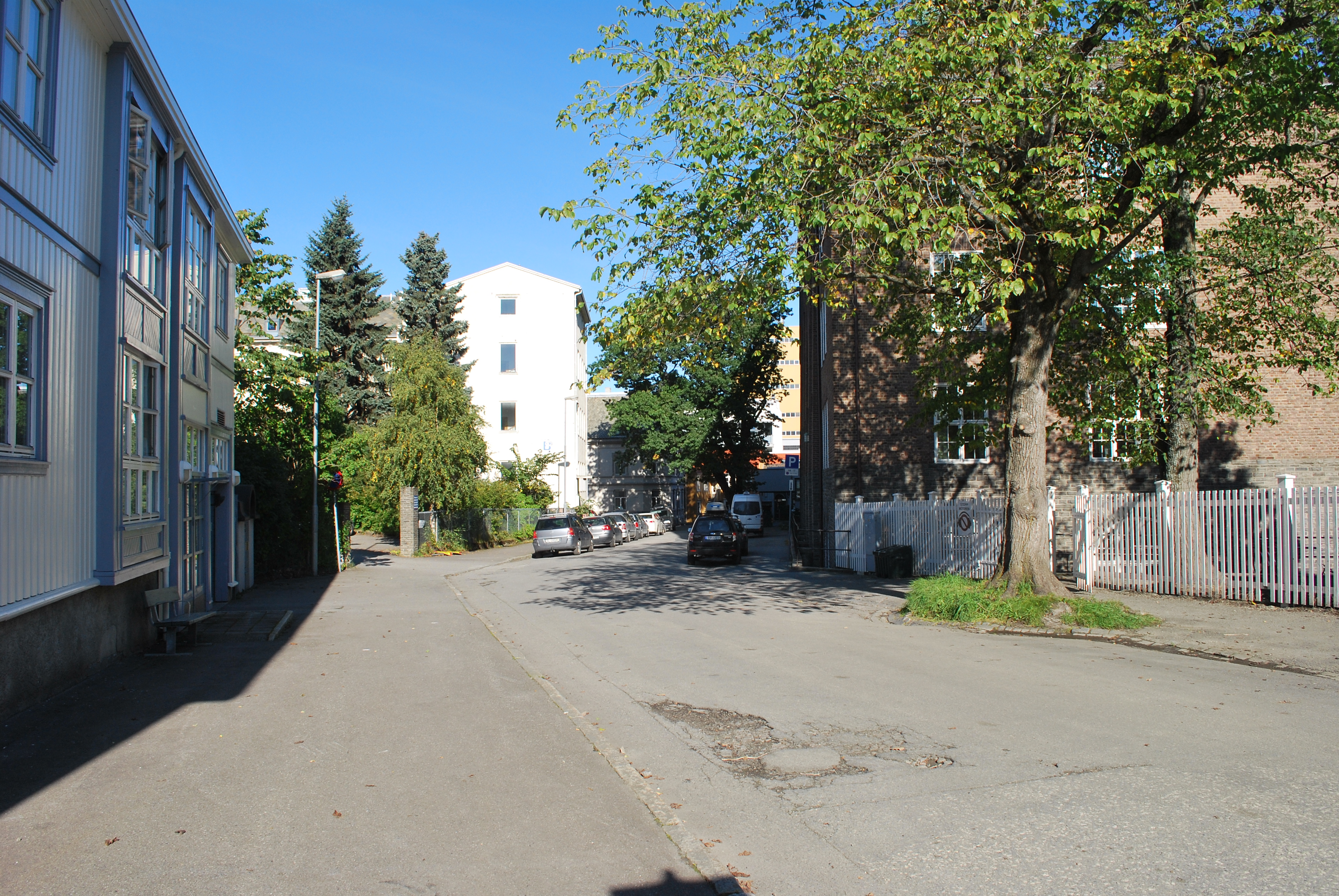 O. J. Høyems gate ved Ila i Trondheim.